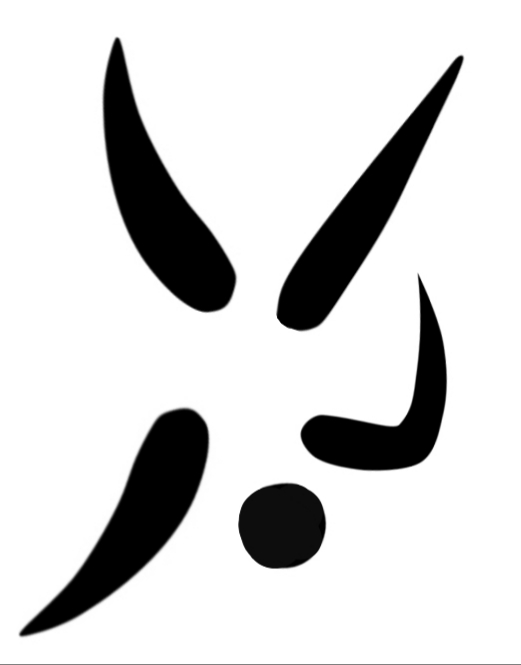 Pictograma Olímpico del Break Dance